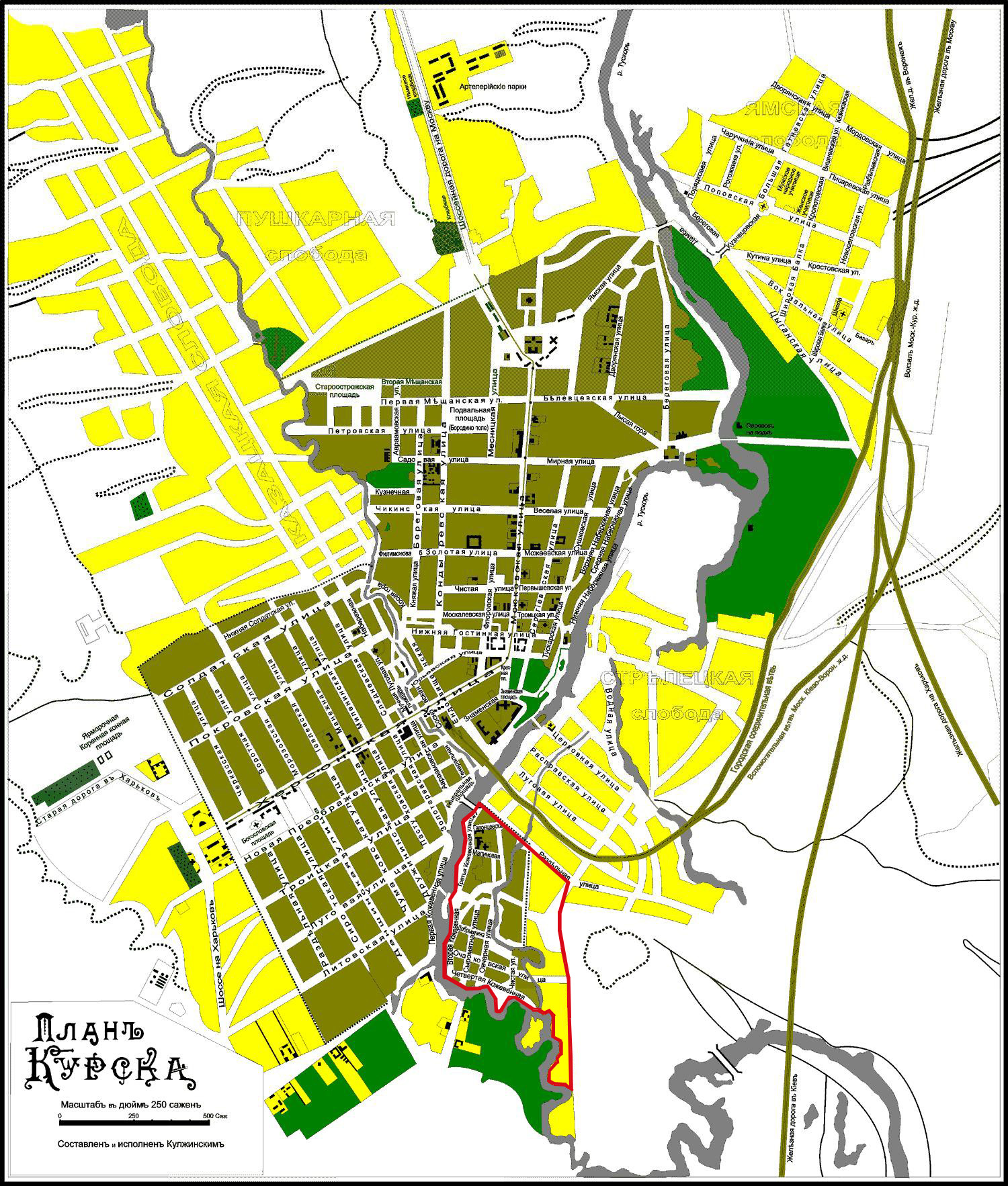 План Курска, 1902 год. Красным цветом выделены границы Очаковской слободы